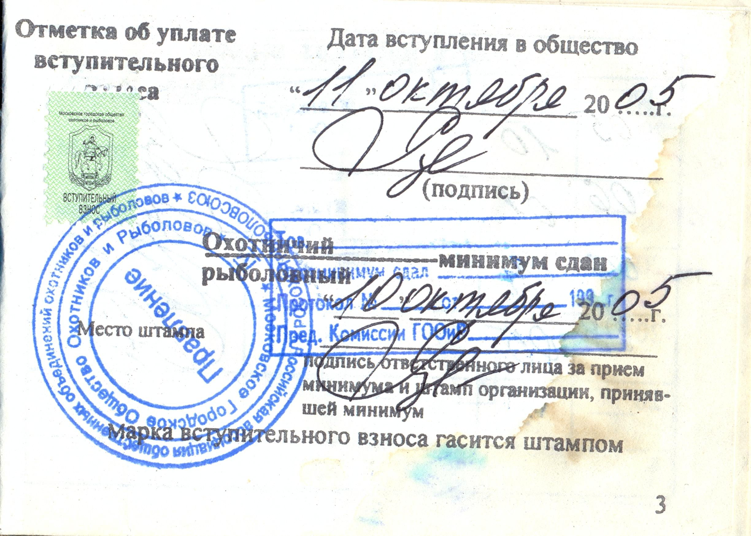 Страница охотничьего билета с отметкой о сдаче охотминимума